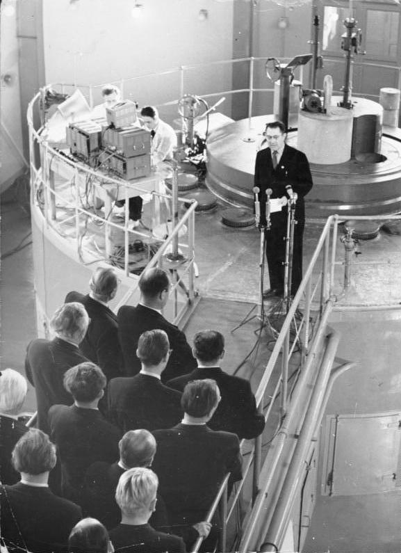 Dresden-Rossendorf, Forschungsreaktor, Einweihung Zentralbild / Quasch / Löwe, 16.12.1957 Erster Reaktor der DDR in Betrieb genommen. Der erste Atomreaktor der DDR, der in der Nähe von Dresden errichtet wurde, ist am 16.12.1957 mittags in Betrieb genommen worden. Es waren anwesend Volkskammerpräsident Dr. h. c. Johannes Dieckmann, Ministerpräsident Otto Grotewohl, der Stellvertreter des Vorsitzenden des Ministerrats Fritz Selbmann und weitere Mitglieder der Regierung sowie Mitglieder des Politbüros des ZK der SED und Mitglieder des wissenschaftlichen Rates für die friedliche Anwendung der Atomenergie, Prof. Dr. Barwich. Der Leiter des Zentralinstituts für Kernphysik in Dresden übernahm den Schlüssel des Reaktorgebäudes. UBz: Fritz Selbmann während seiner Festansprache. Abgebildete Personen: Selbmann, Fritz: Stellvertretender Ministerpräsident, SED, KPD, USPD, MdL Preußen, MdR, DDR